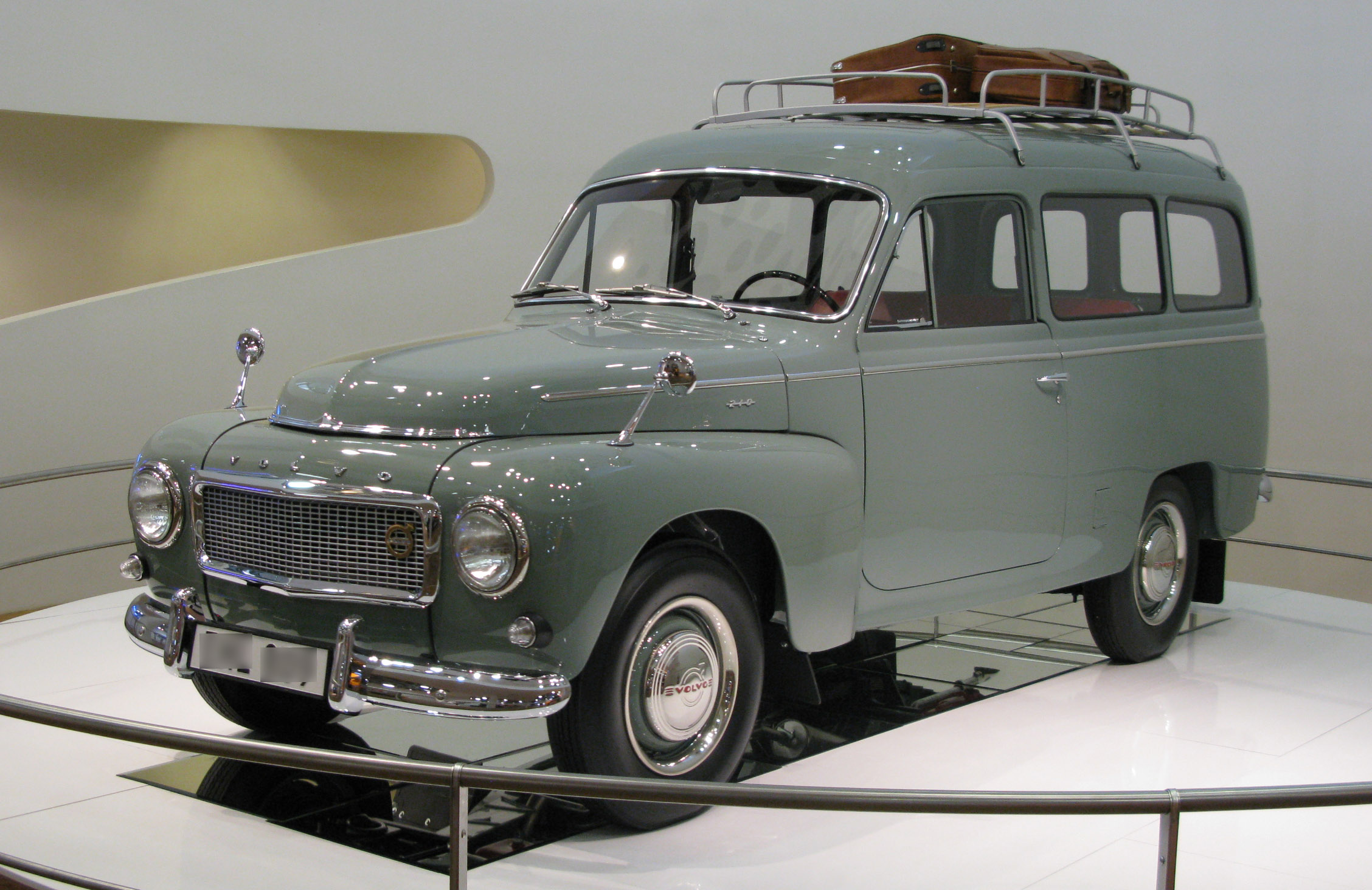 1960 Volvo Duett 211